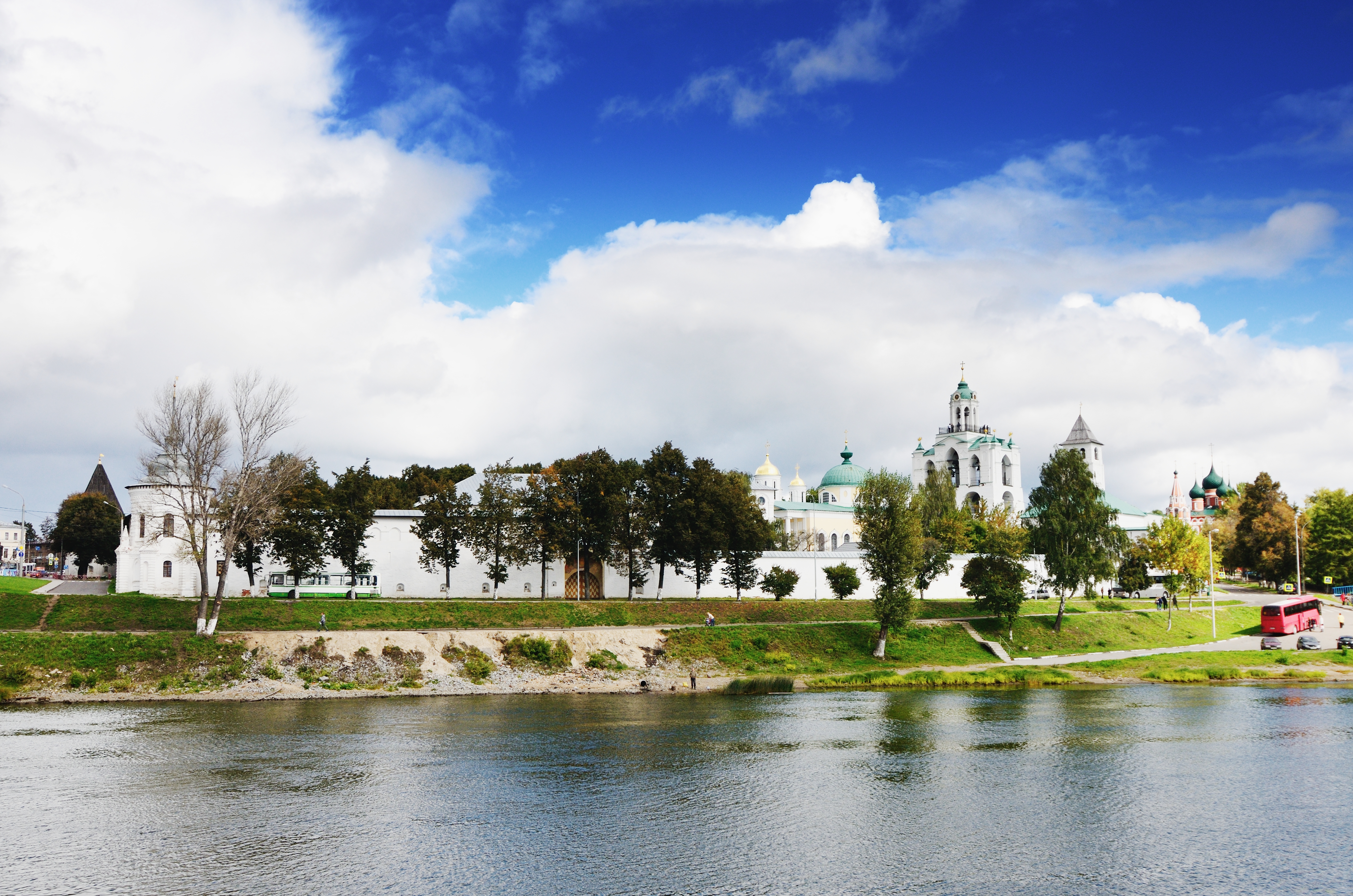 Ансамбль спасо-преображенского монастыря, г.Ярославль.